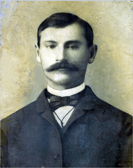 Антон Гущо, дедушка